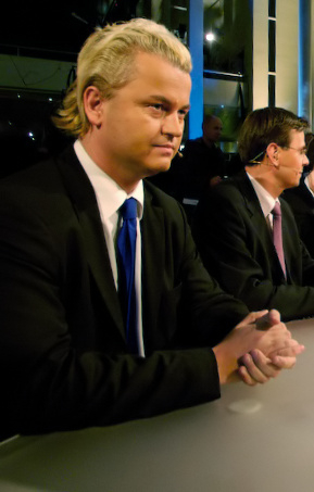 Alle lijsttrekkers nemen plaats aan tafel bij het slotdebat van de tweede kamer verkiezingen in 2006. Opdrachtgever: VVD